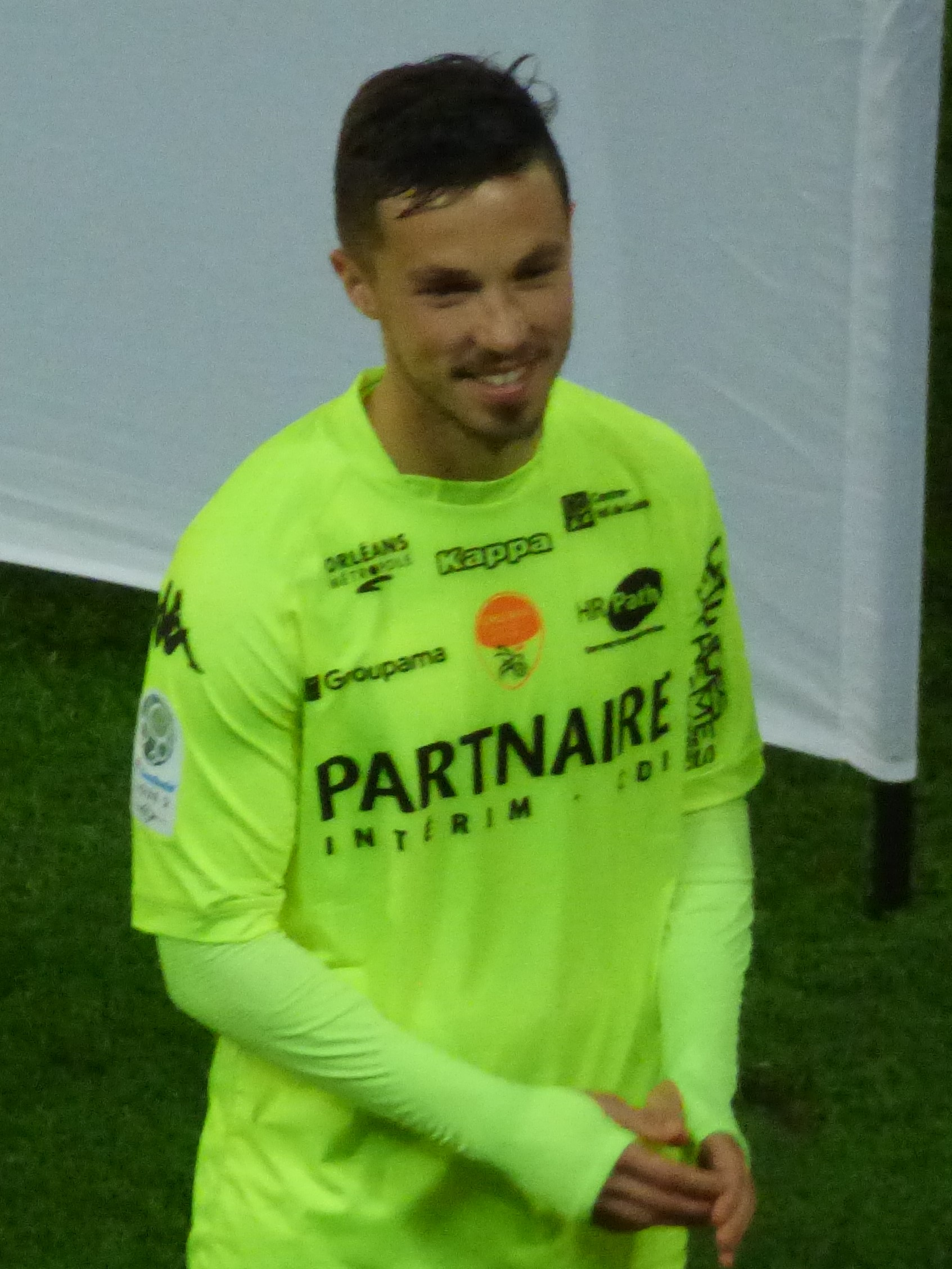 Maxime D'Arpino avant le match RC Lens / US Orléans, comptant pour la vingt-huitième journée du championnat de France de football de Ligue 2 2019/2020, le 9 mars 2020.